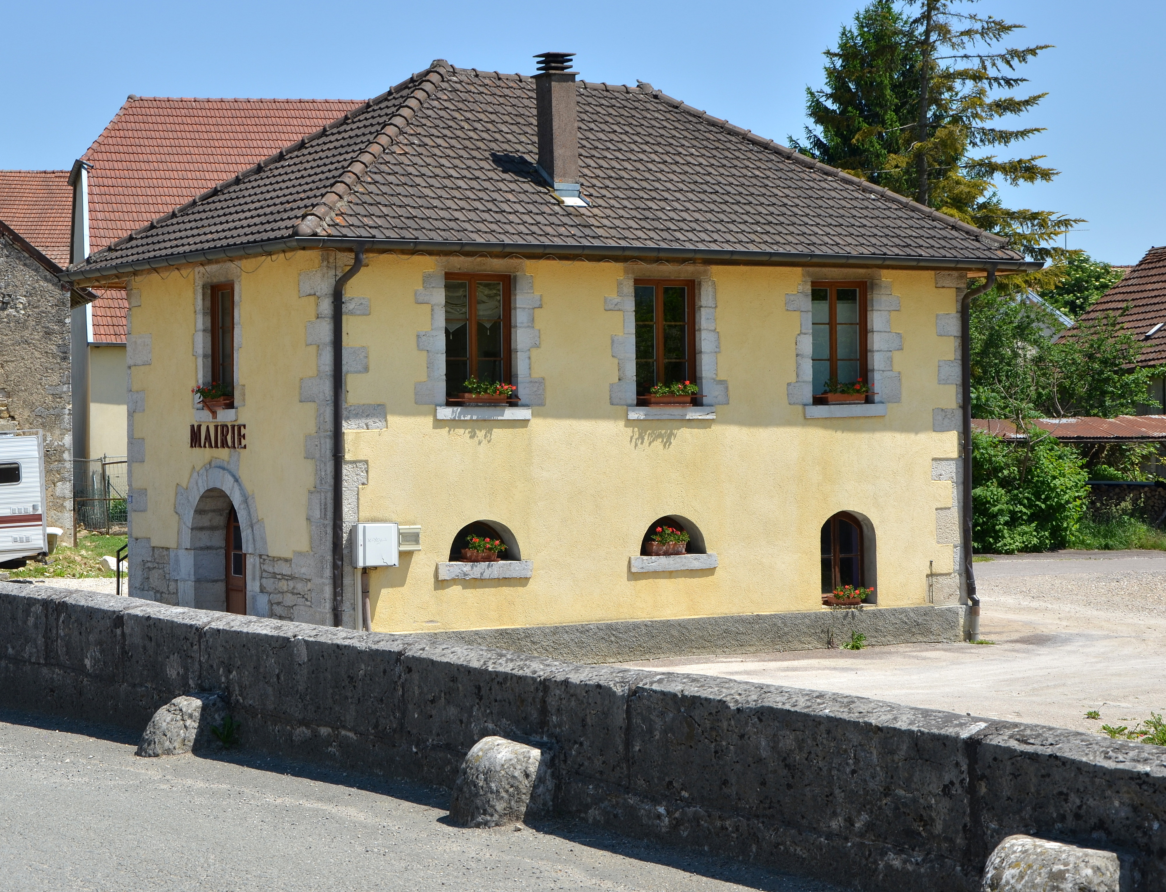 Mairie de Pompierre sur Doubs, Doubs, Franche-Comté, France